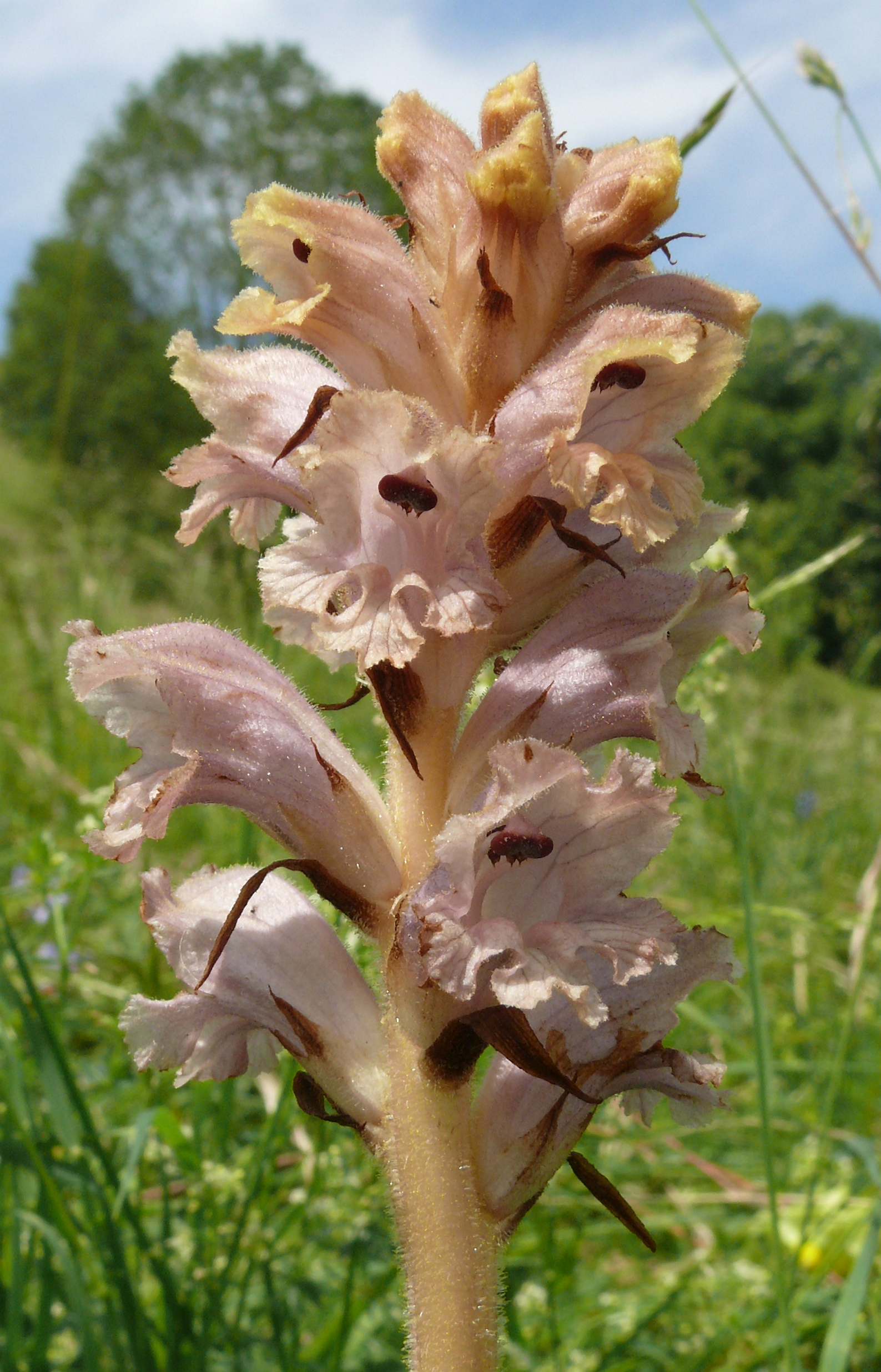 Orobanche caryophyllacea, Nördlinger Ries, Deutschland